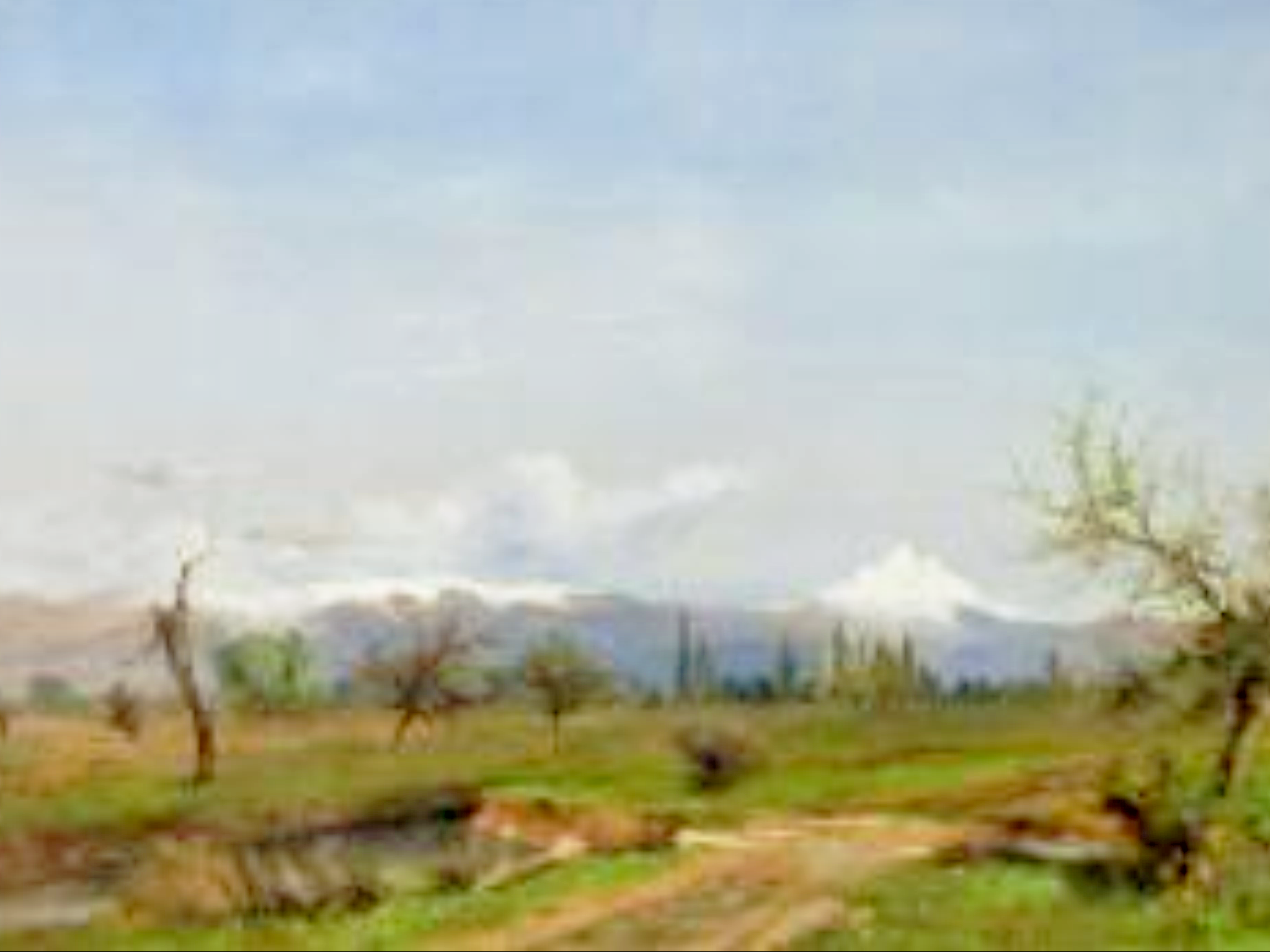 Oleo sobre tela, Nevado de Longavi de Enrique Swinburn Kirk, nació en Santiago de Chile, el 2 de octubre de 1859, y falleció en la misma ciudad el 22 de octubre de 1929. Fue un pintor, dibujante y cronista chileno